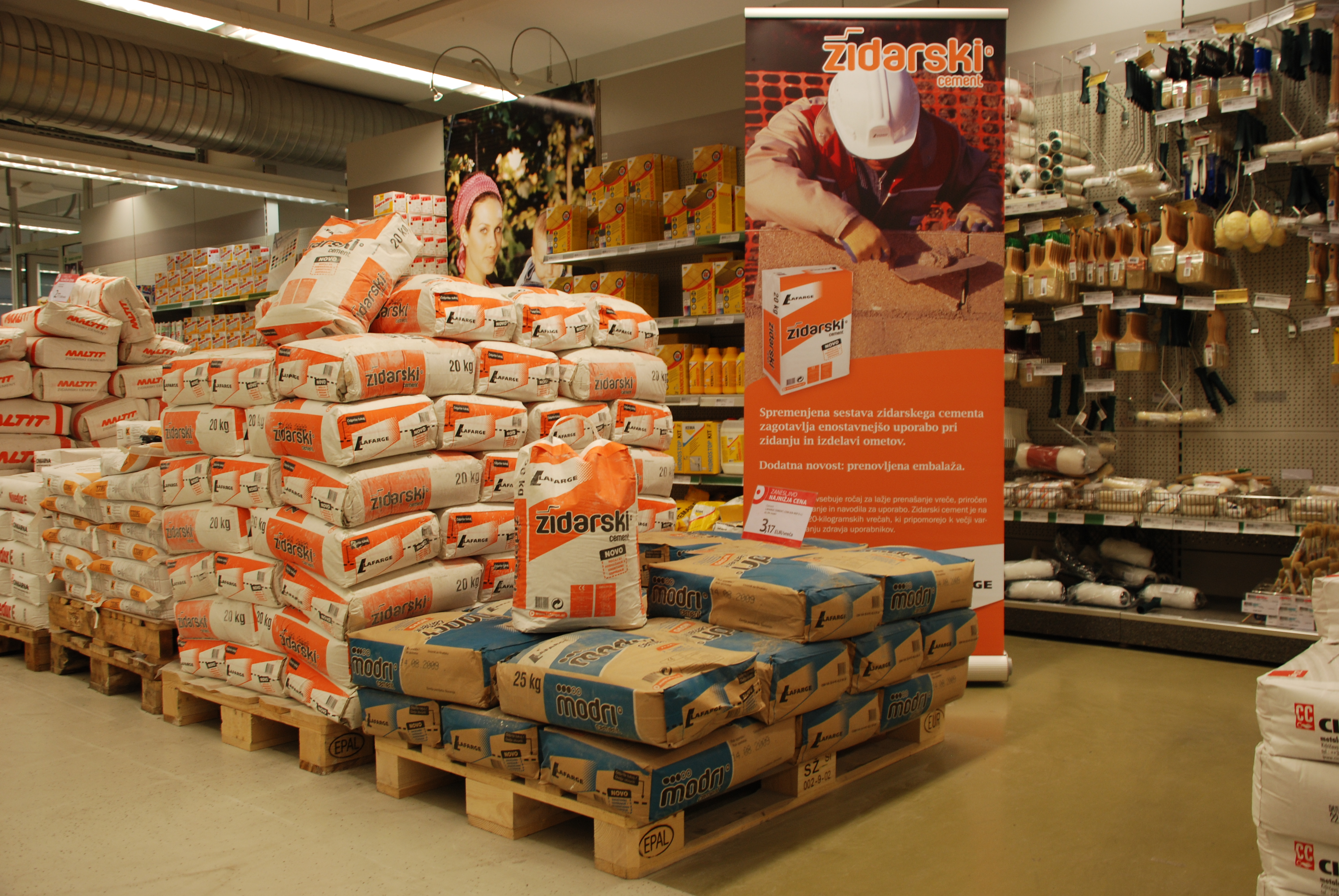 Cement Lafarge v vrečah na prodajnem mestu